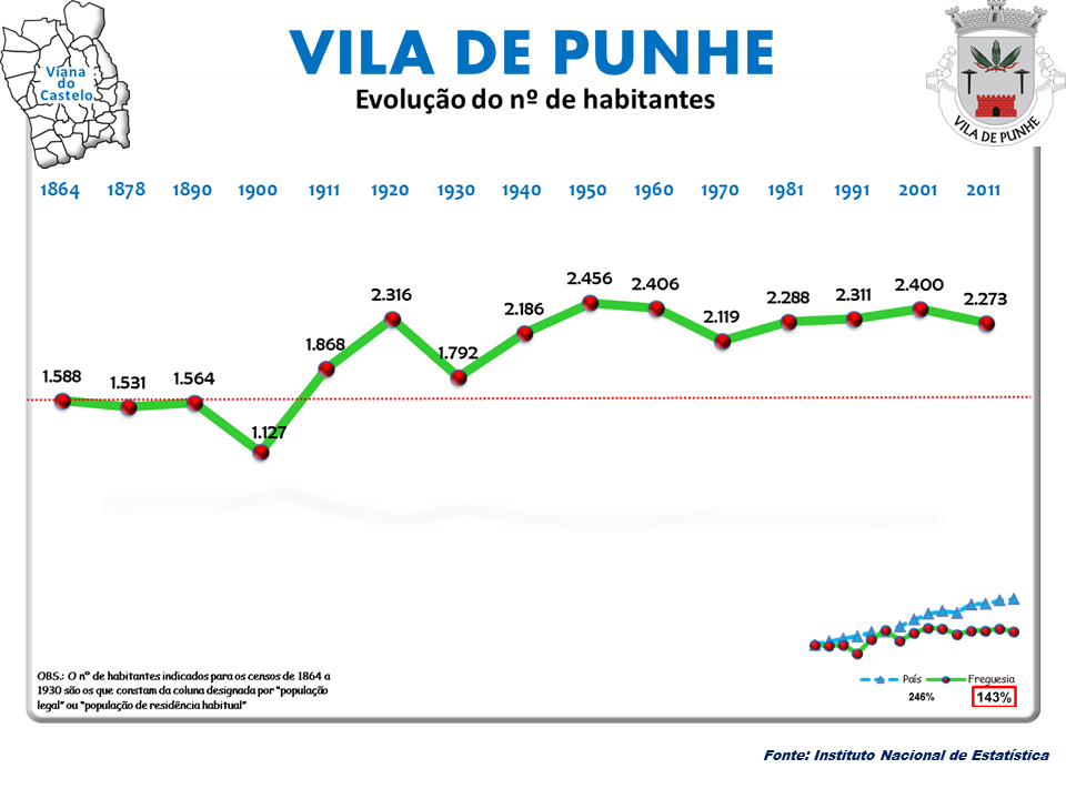 Censos 1864/2011